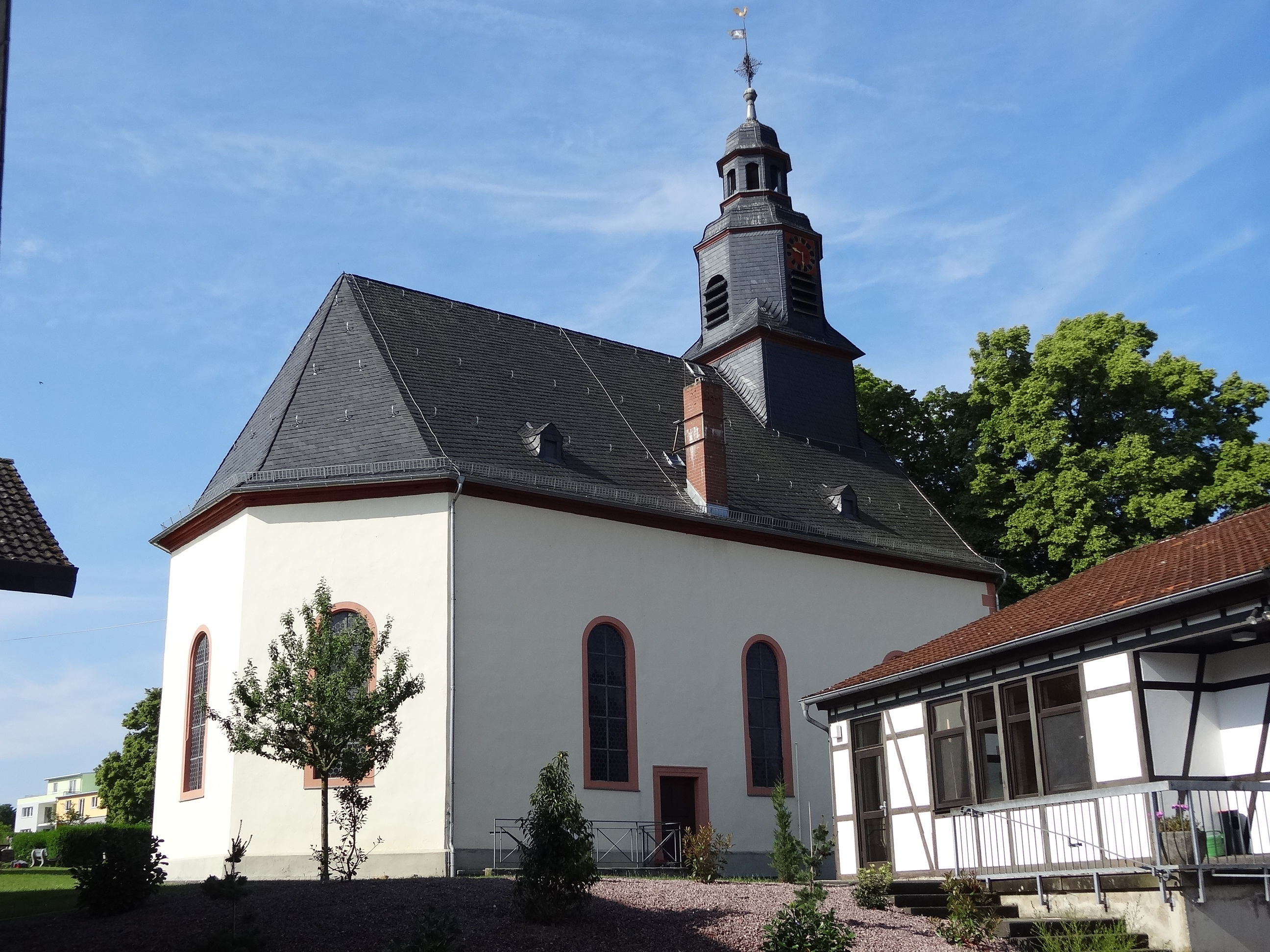 Evangelische Kirche (Fauerbach vor der Höhe)